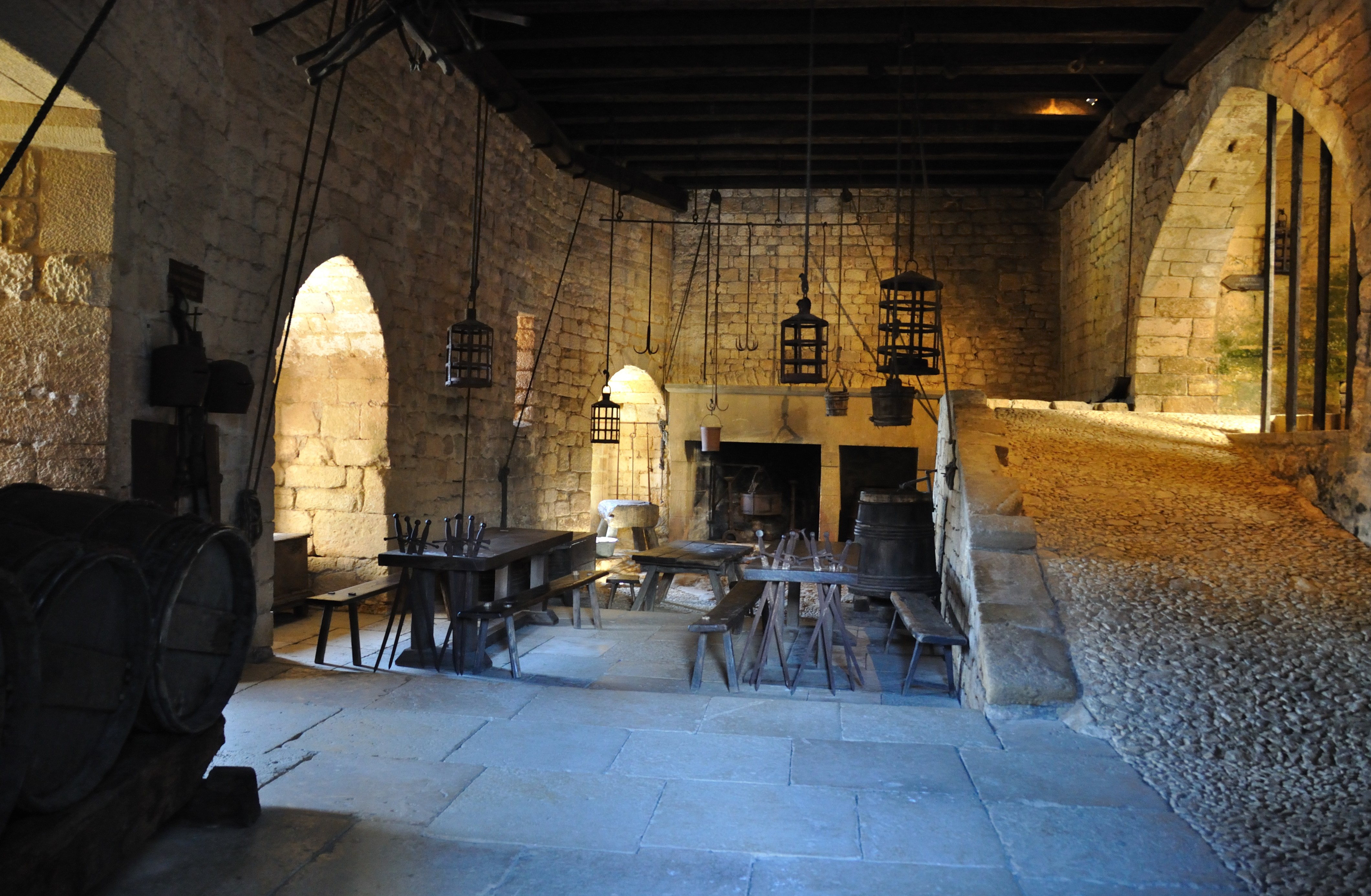 Cuisine du château de Beynac en Dordogne. .